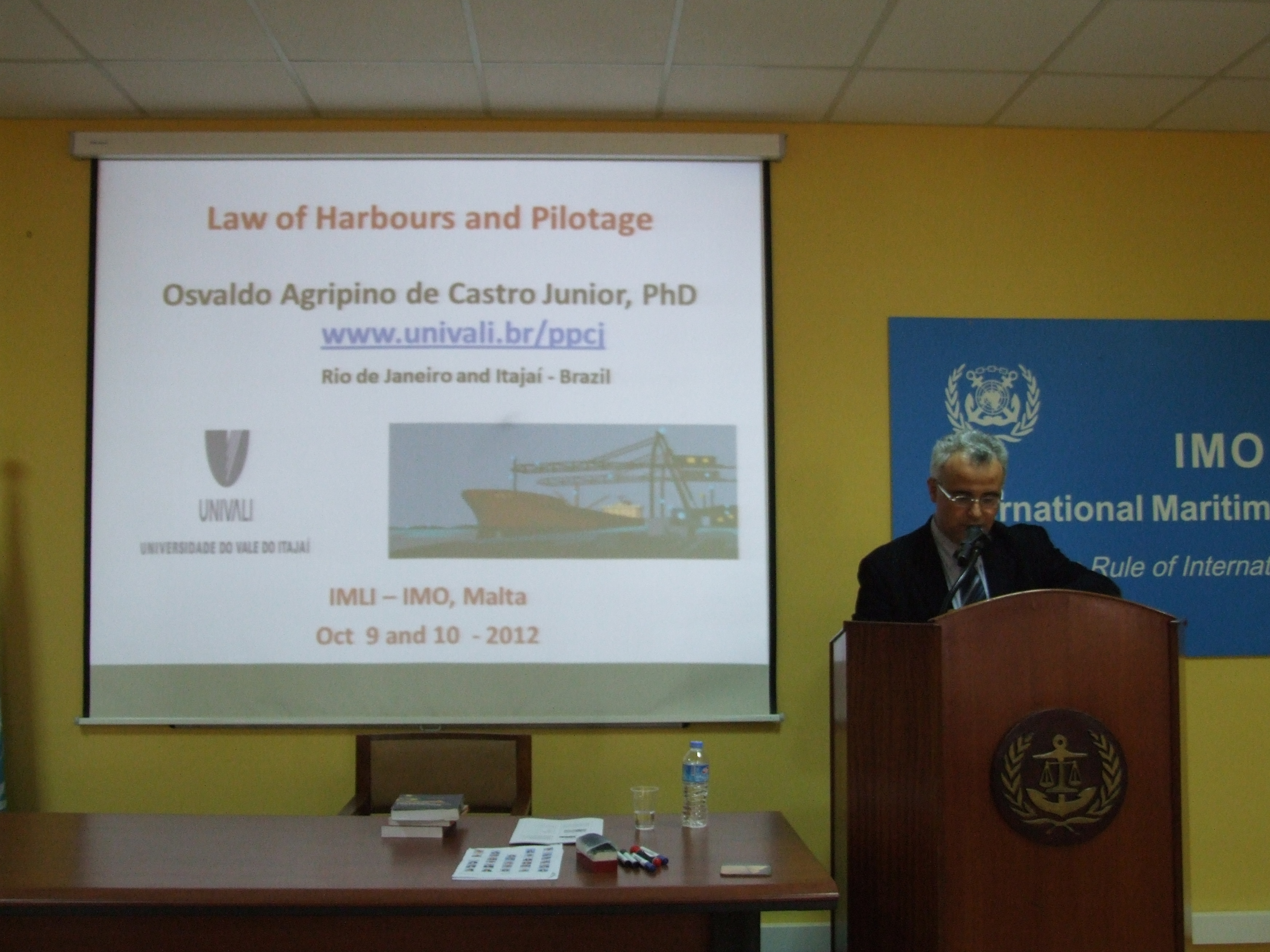 Aula de Osvaldo Agripino de Castro Jr. no IMLI, 2012